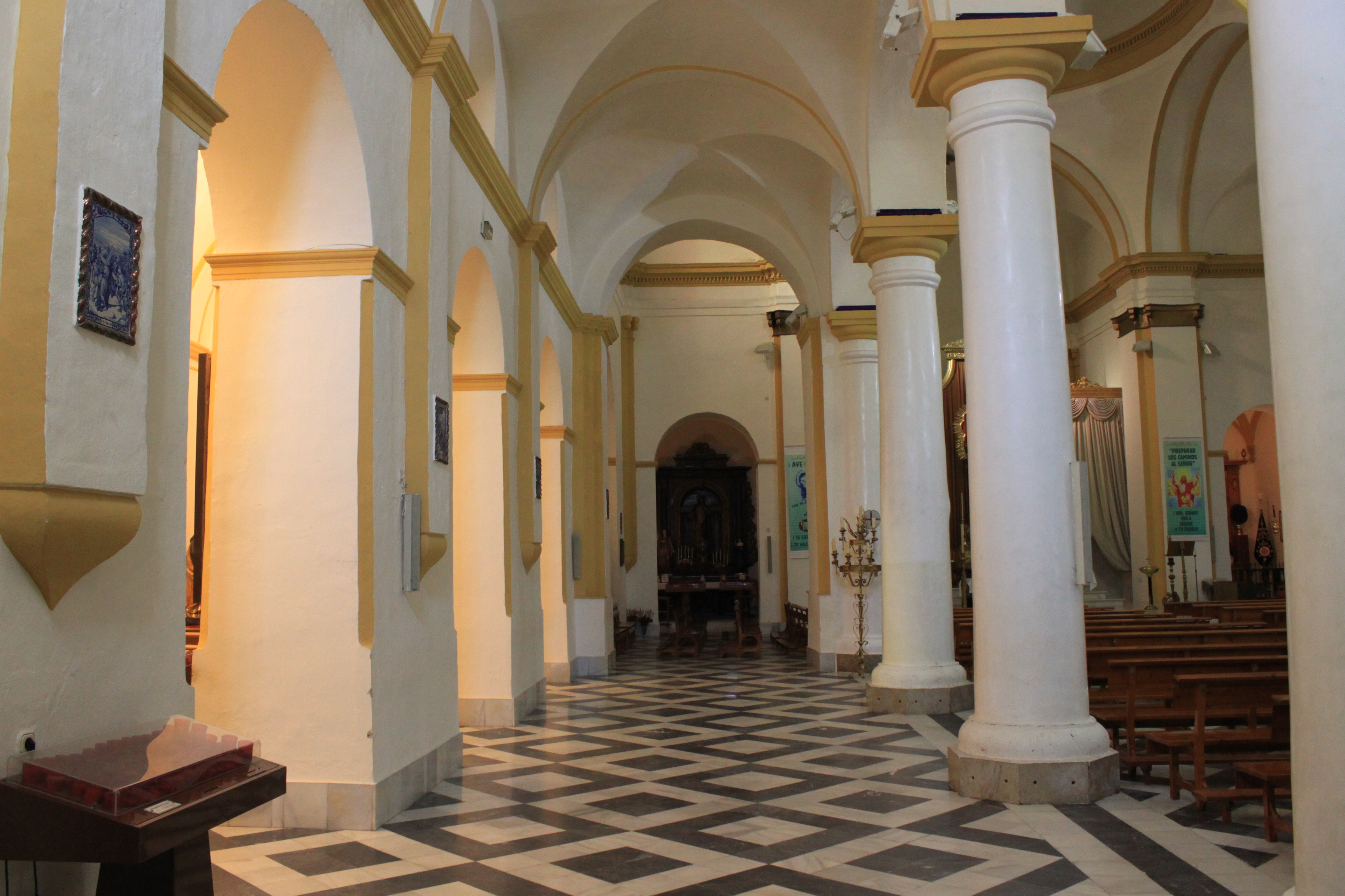 Nave central de la Iglesia de Nuestra Señora de la Palma. Algeciras, Andalucía, España.